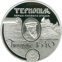 475 років першій писемній згадці про м.Тернопіль срібна реверс